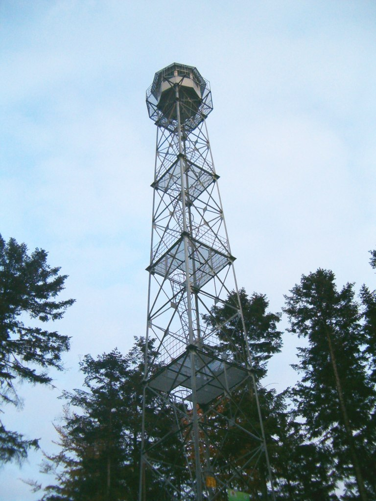 Obserwacyjna wieża pożarowa (wysokość 30 m.)na Górze Dobrzeszowskiej w Górach Świętokrzyskich (woj. świętokrzyskie, powiat kielecki, gmina Łopuszno)